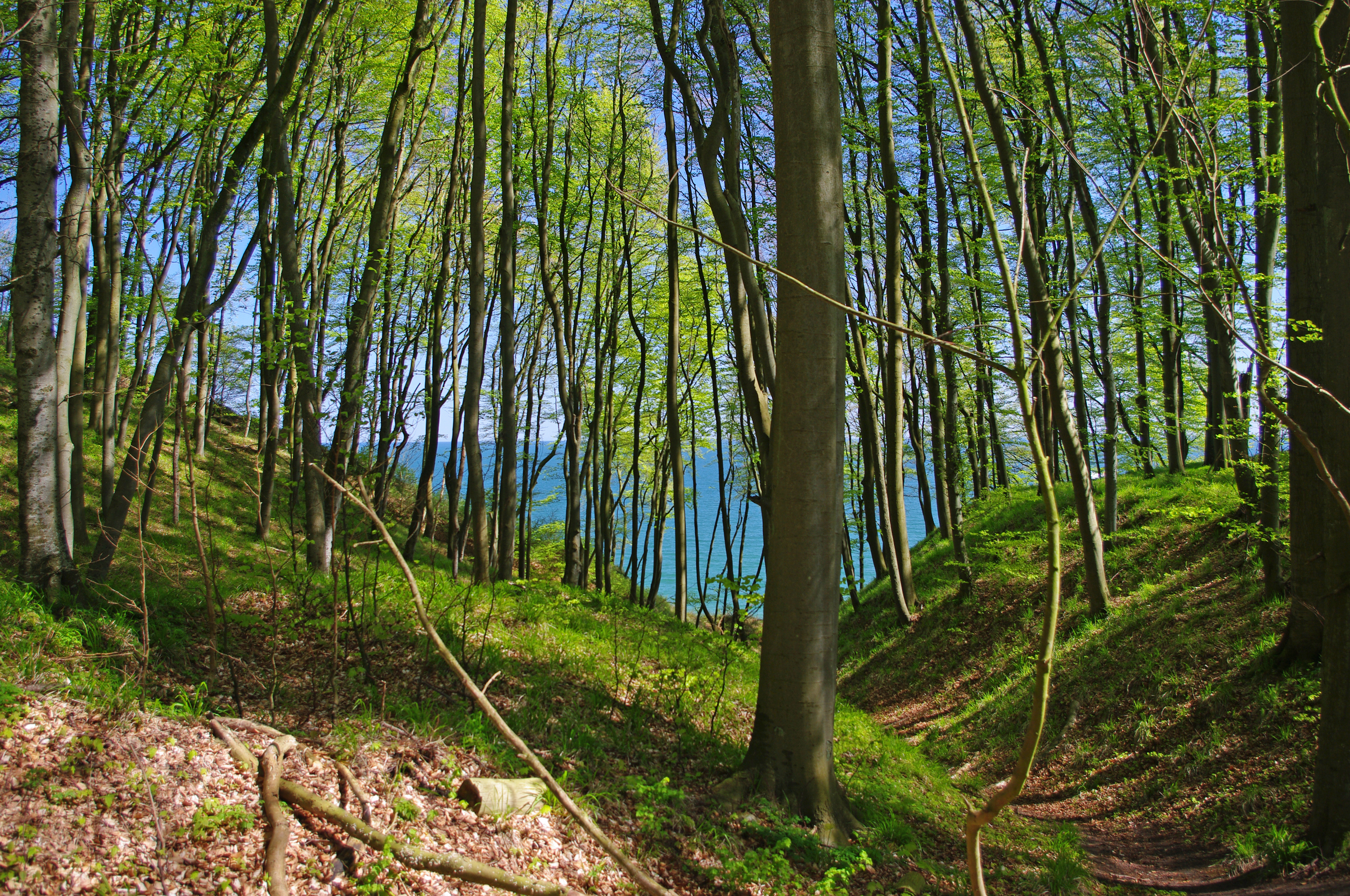 NSG Granitz (Biosphärenreservat Südost-Rügen): Hochuferweg zwischen Seelin und Binz im Frühling, Blick auf die Ostsee